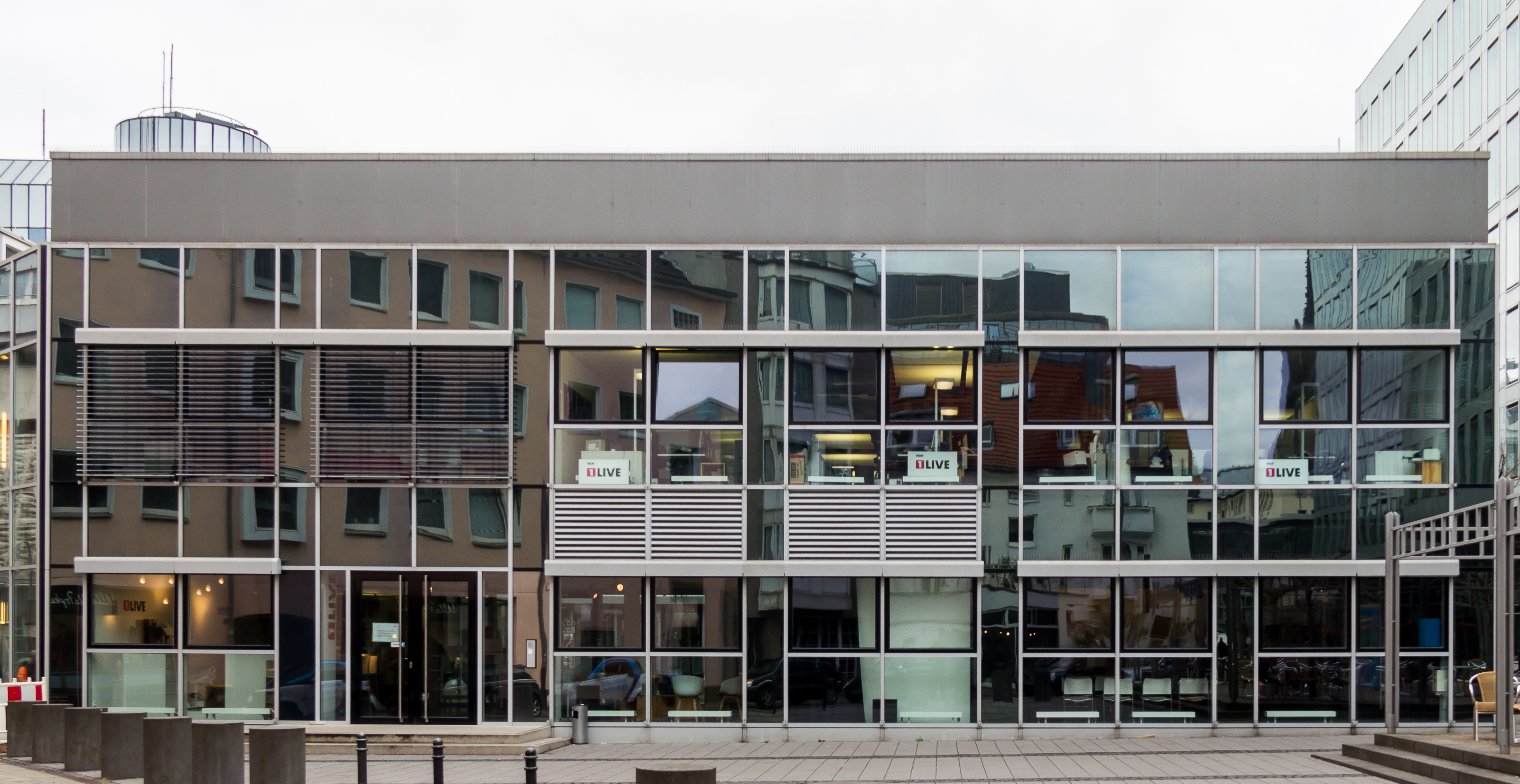 Sendezentrum des Jugendradios 1Live: Das 1Live-Haus, Köln